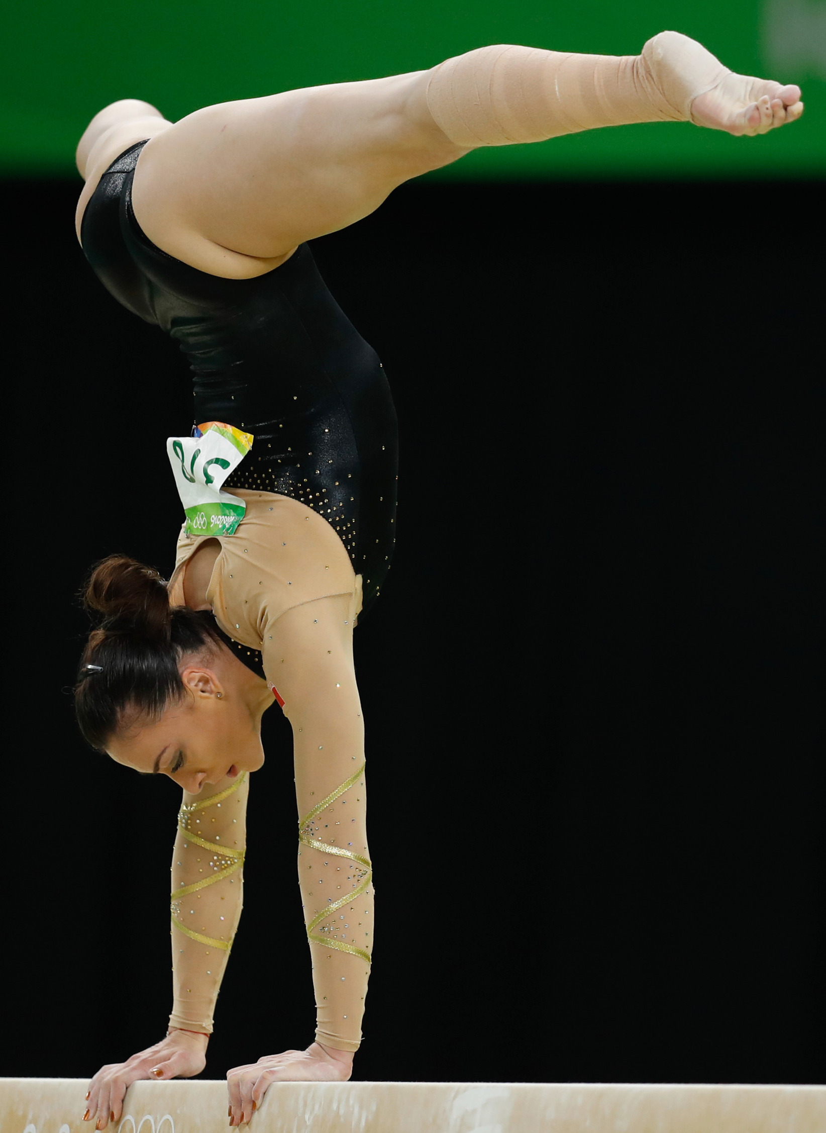 Rio de Janeiro - Ginasta da Romênia Catalina Ponor termina final por aparelhos da trave na 7ª posição (Fernando Frazão/Agência Brasil)